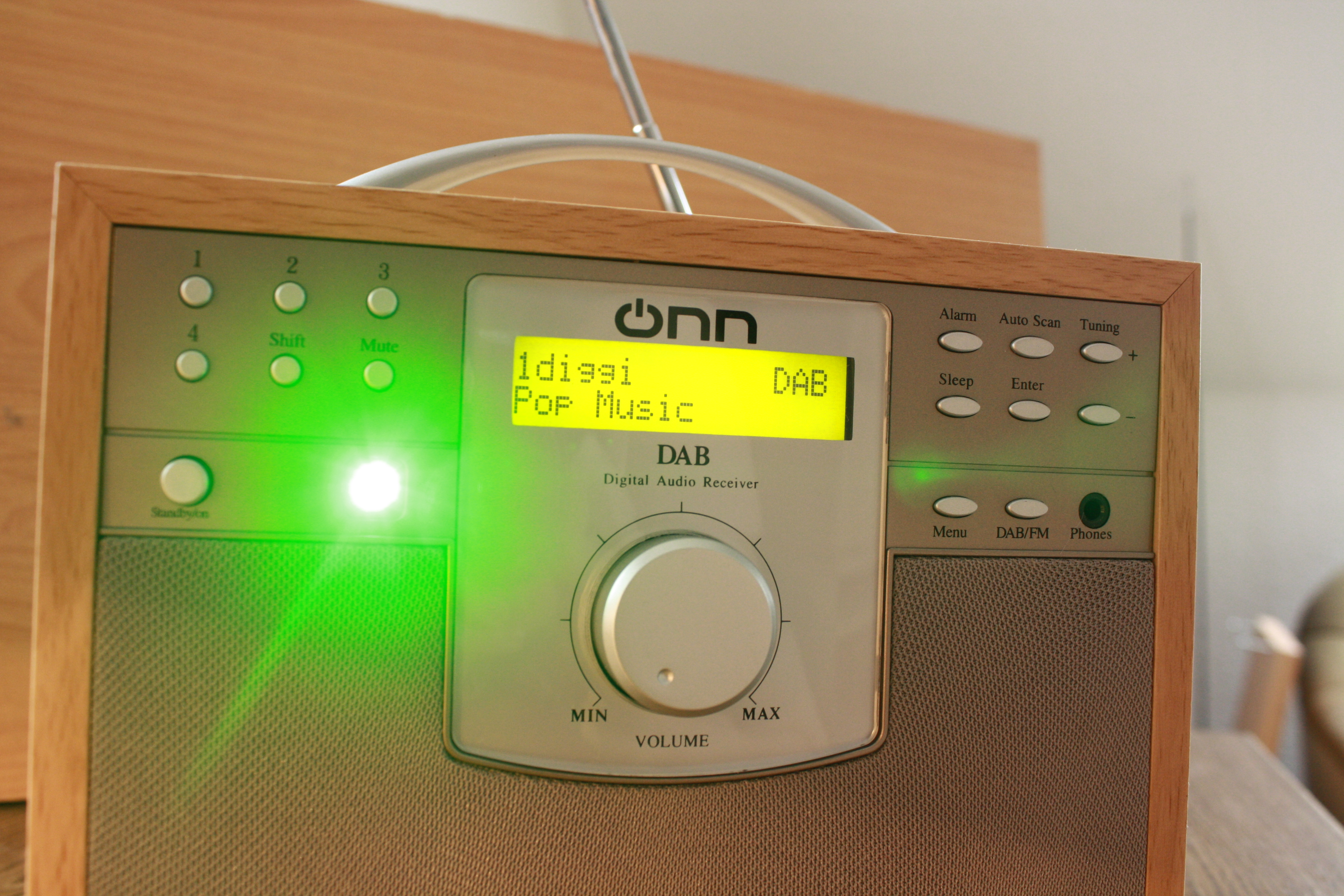 DAB III Radio ONN ODABR01 (Original Albrecht DR 600)